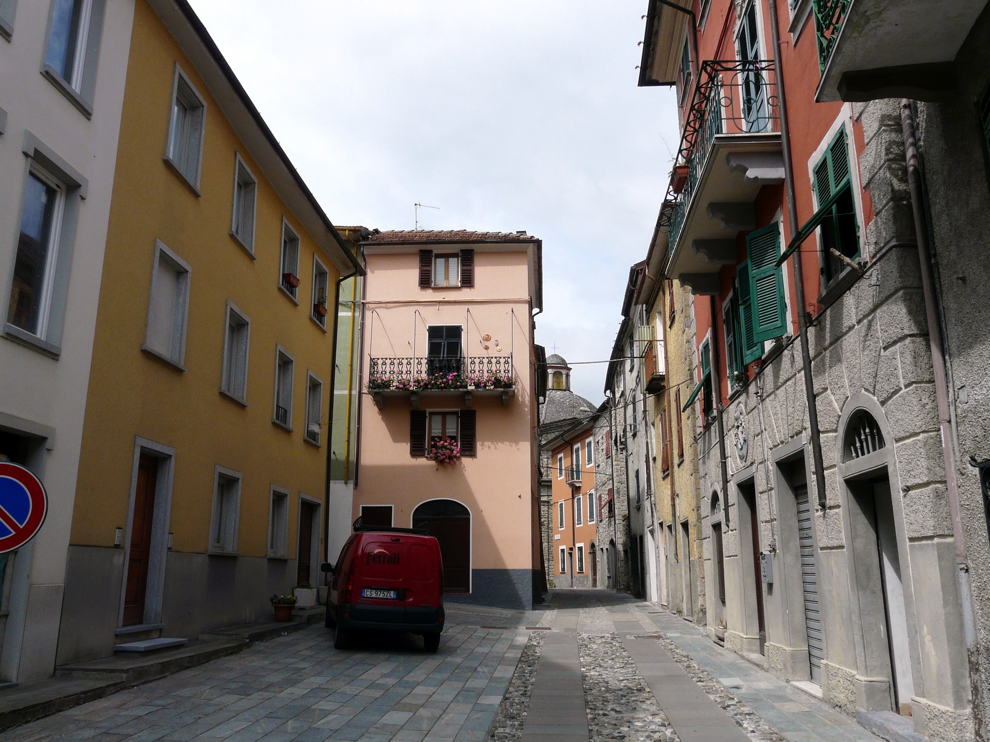 Centro storico di Ottone, Emilia-Romagna, Italia